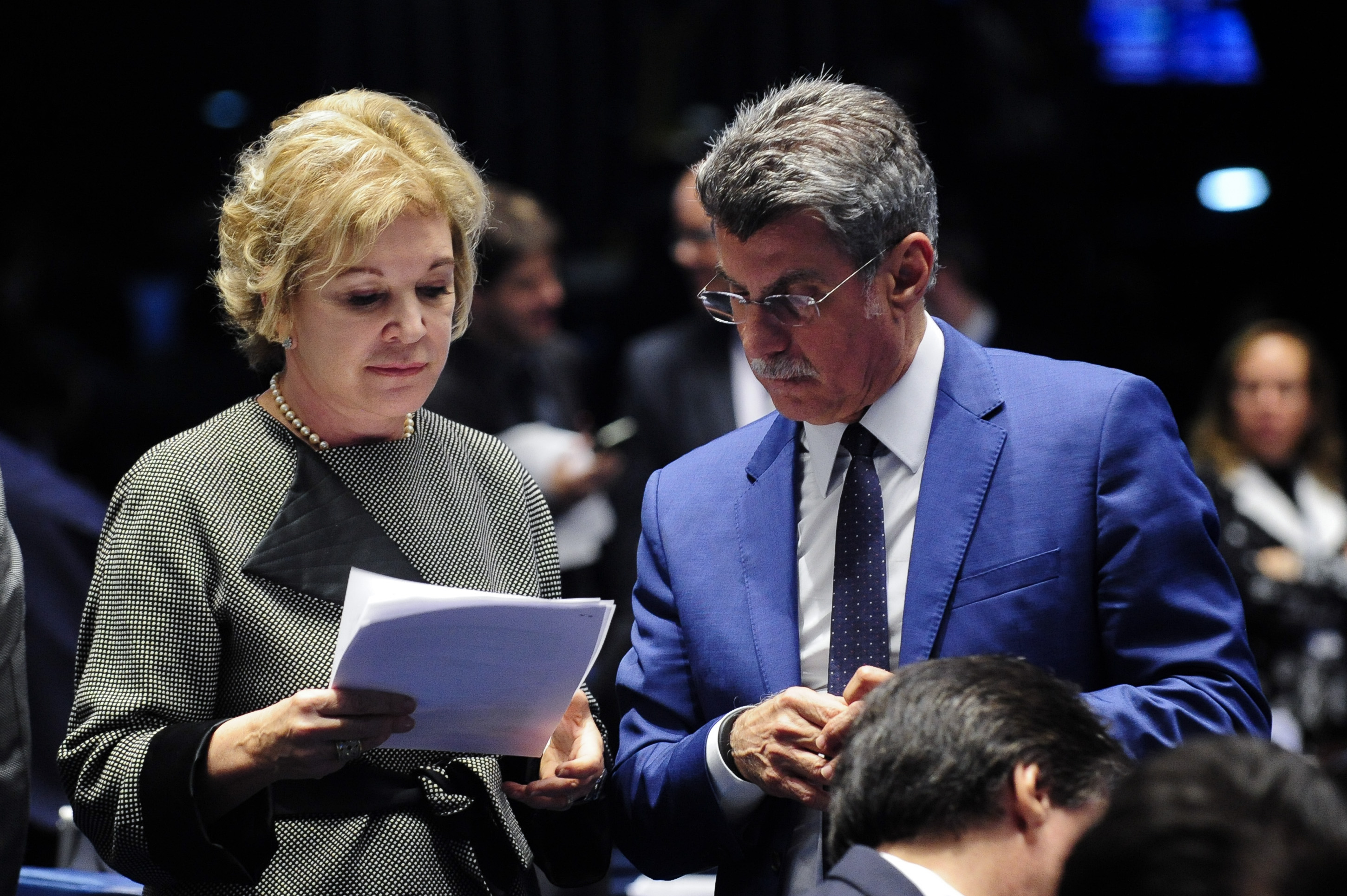 Plenário do Senado durante sessão deliberativa ordinária (E/D): senadora Marta Suplicy (PMDB-SP); senador Romero Jucá (PMDB-RR). Foto: Jonas Pereira/Agência Senado